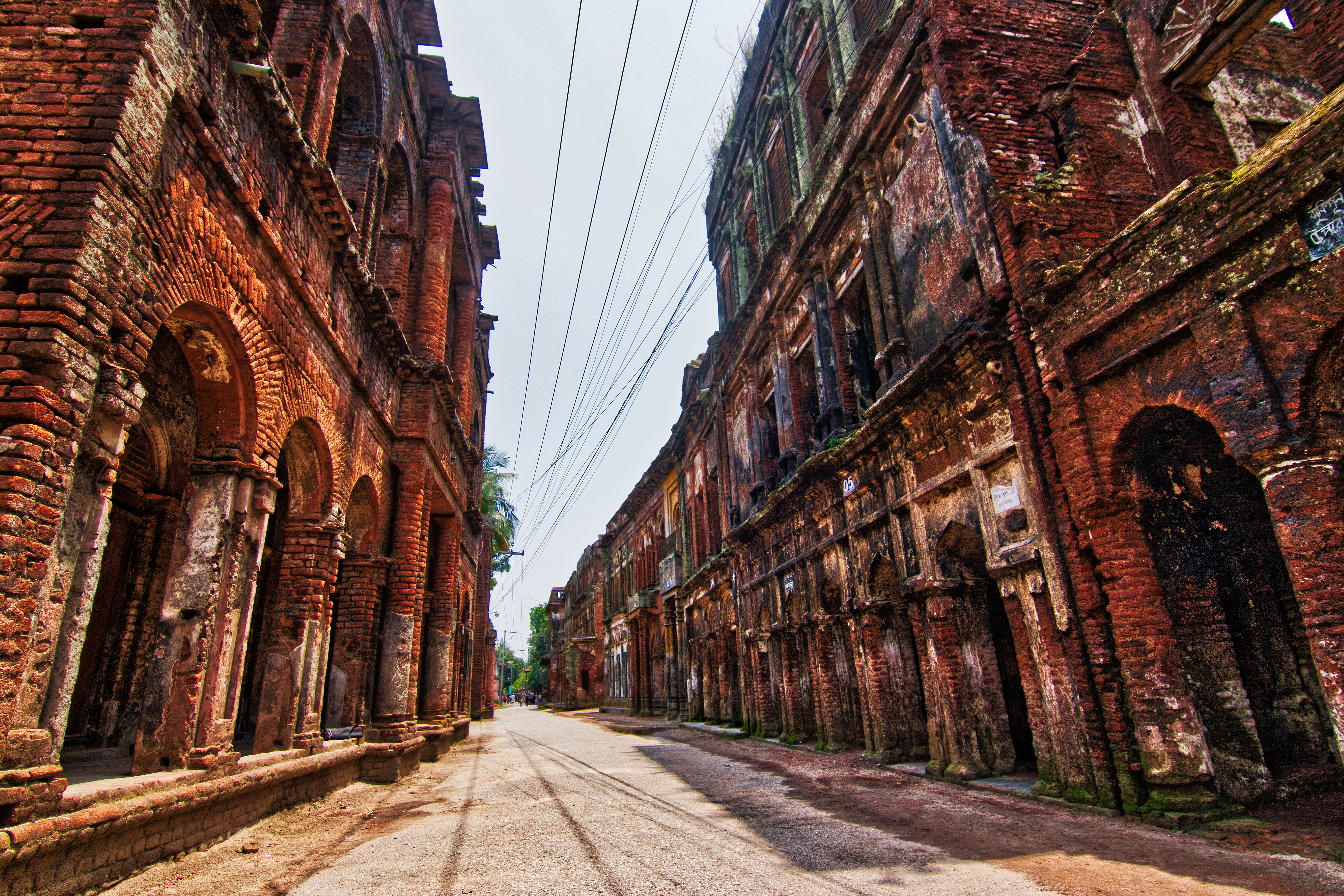 পানাম নগর